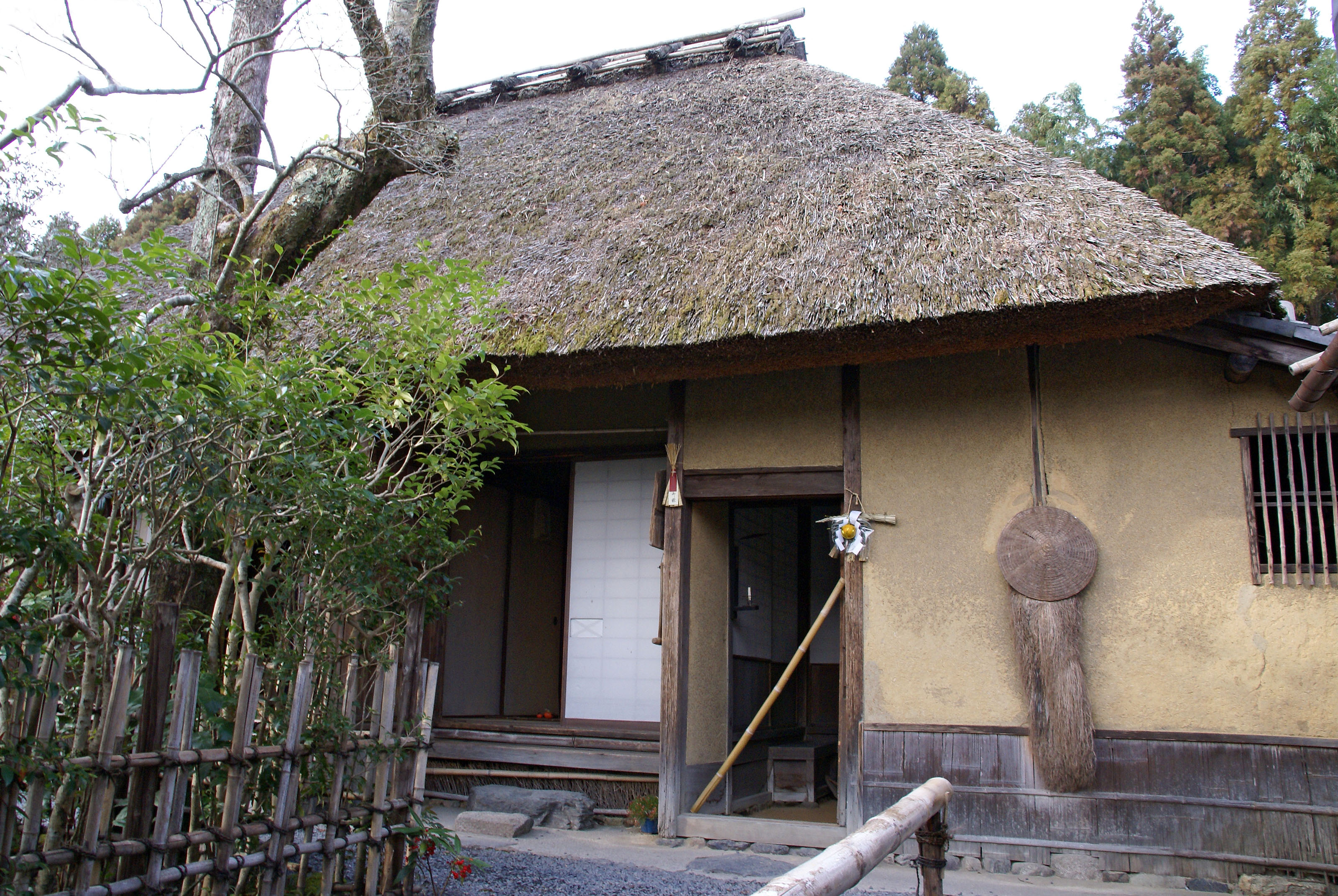 Rakushisha in Sagano, Kyoto, Japan